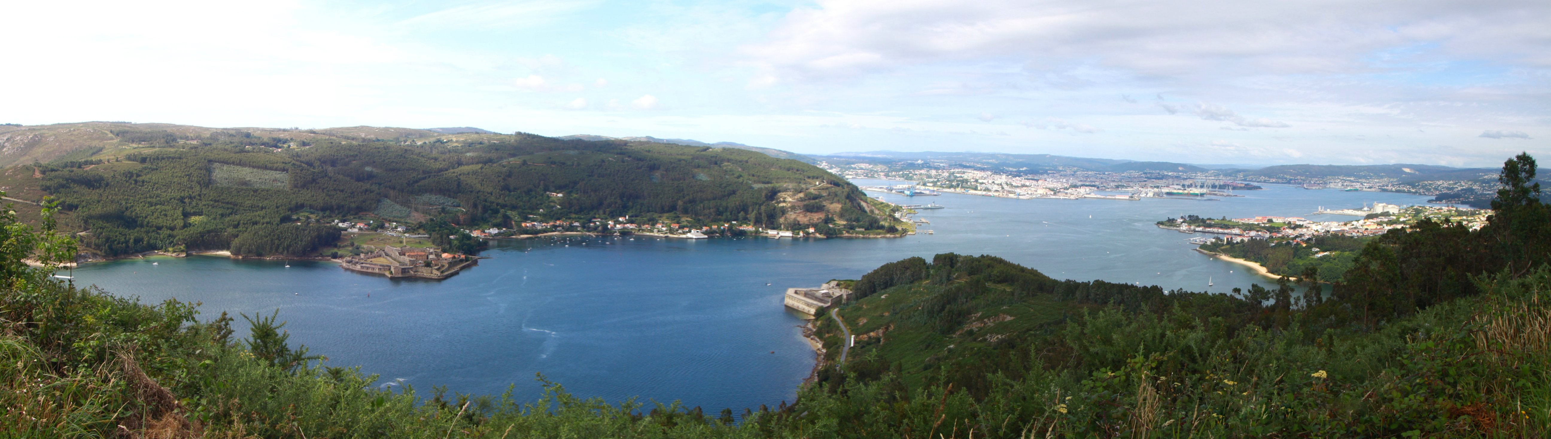 Panorámica de la Ría de Ferrol desde el monte Montefaro (Ares, A Coruña) Removed watermark: Moncho Piñeiro 09